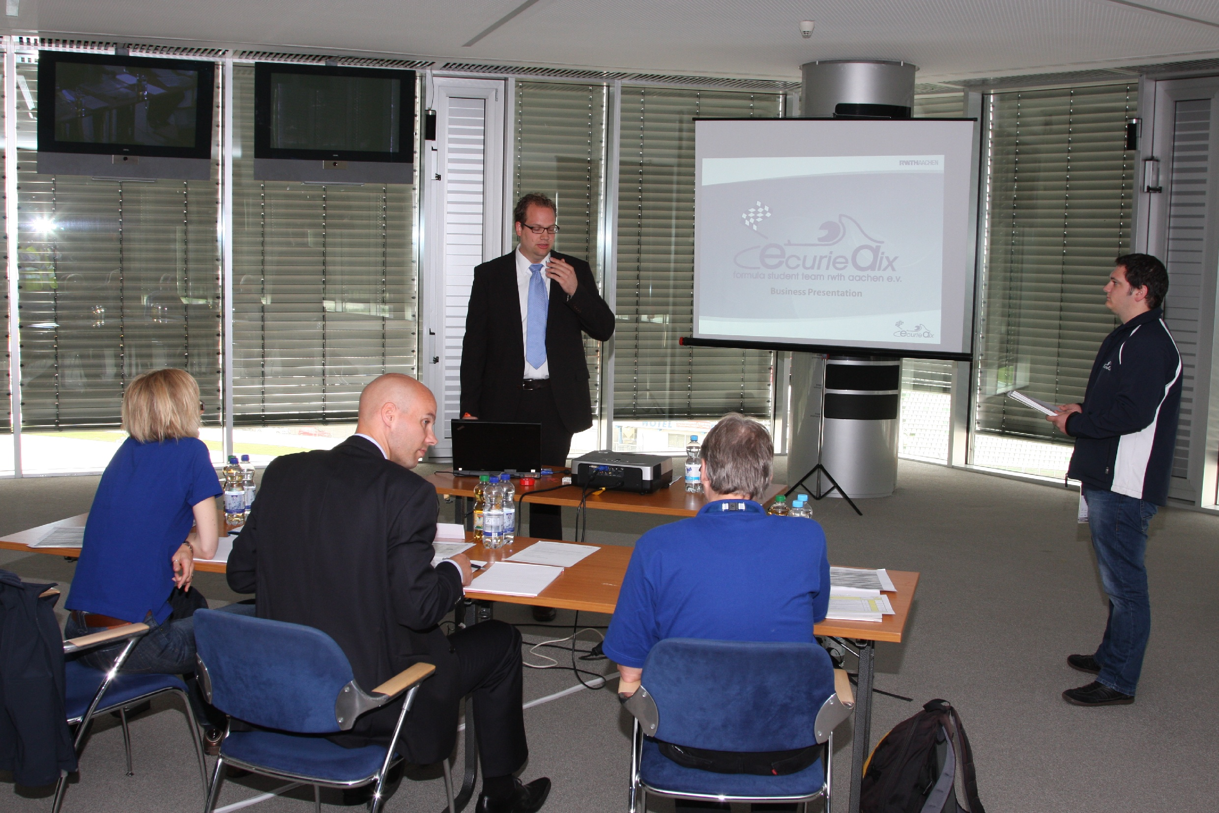 FSG Business Plan Presentation